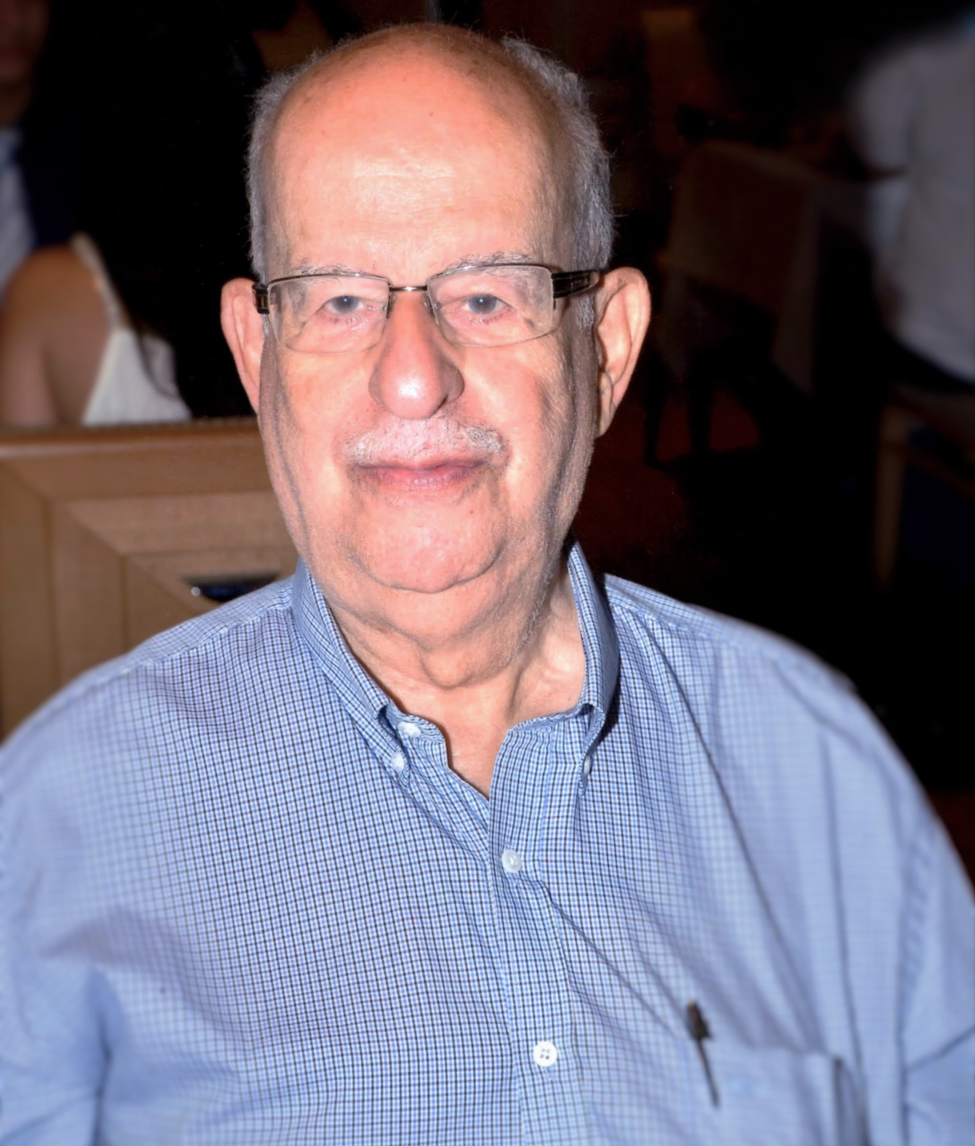 Francisco Falcon em 2015